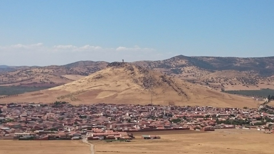 Vista de Fuente el Fresno